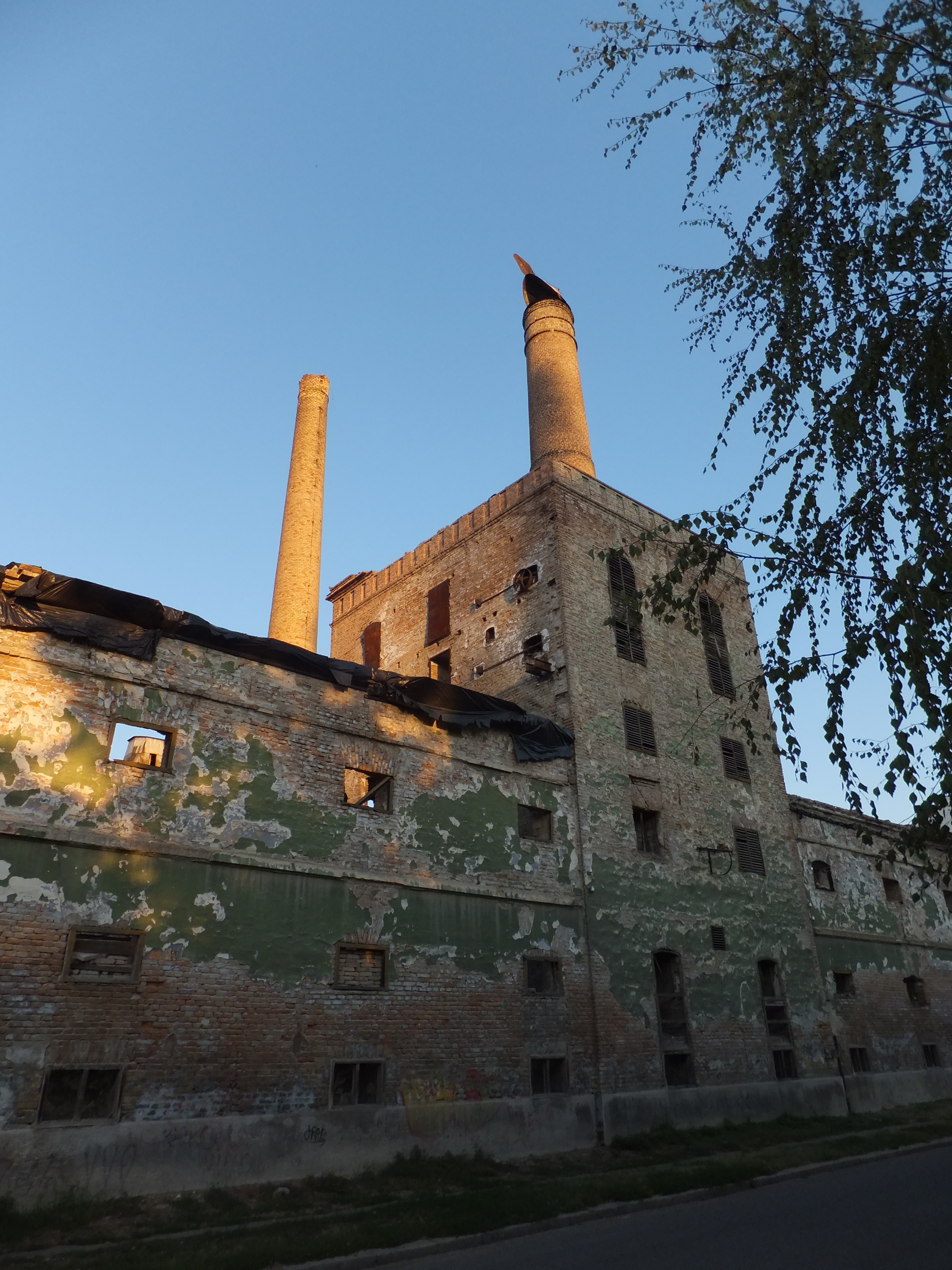 Зграда Народне пиваре у Панчеву